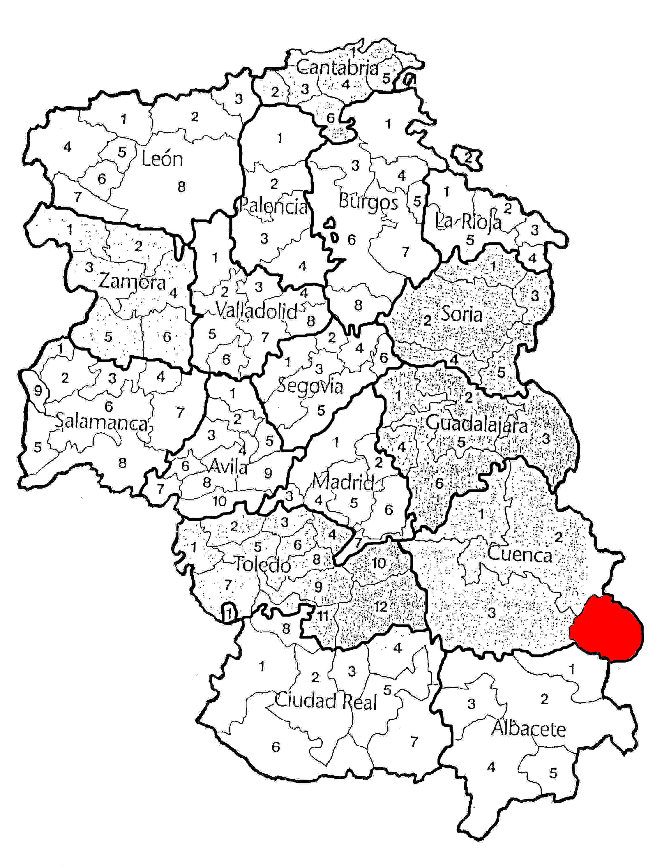 Mapa de comarcas de Castilla según los movimientos nacionalistas y regionalistas castellanos.